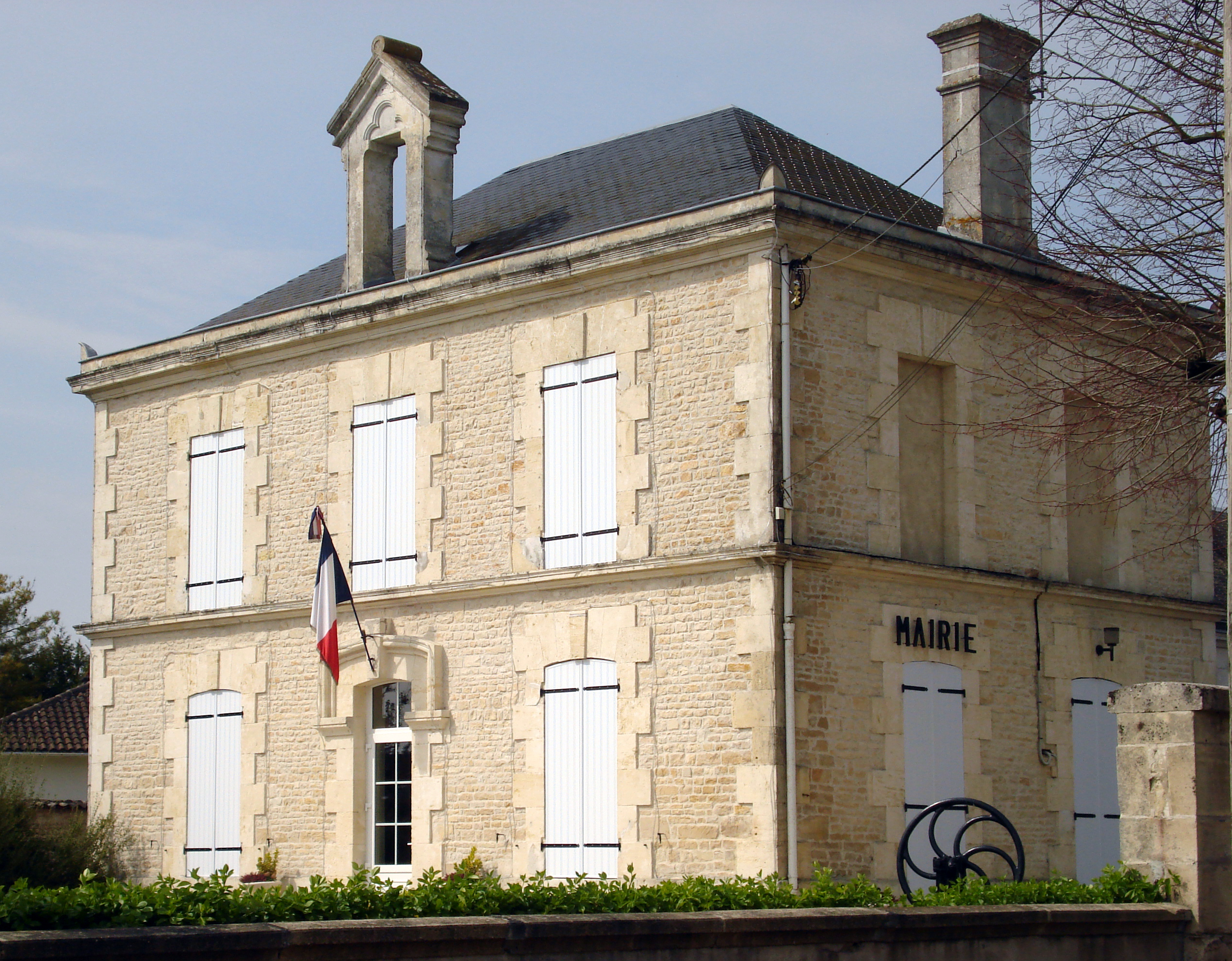 La mairie de Chives en Charente-Maritime